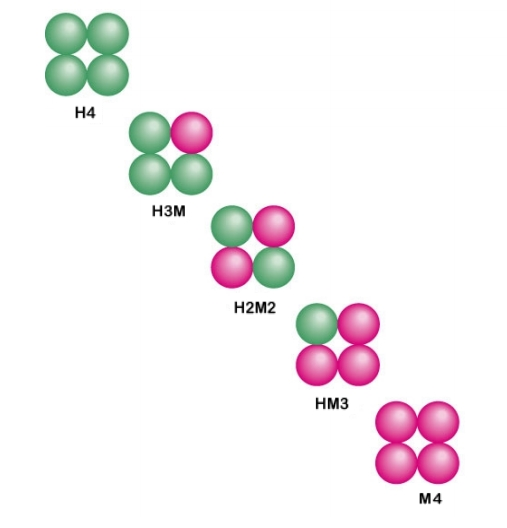 الإنزيمات النازعة لحمض اللبن - نظائرها